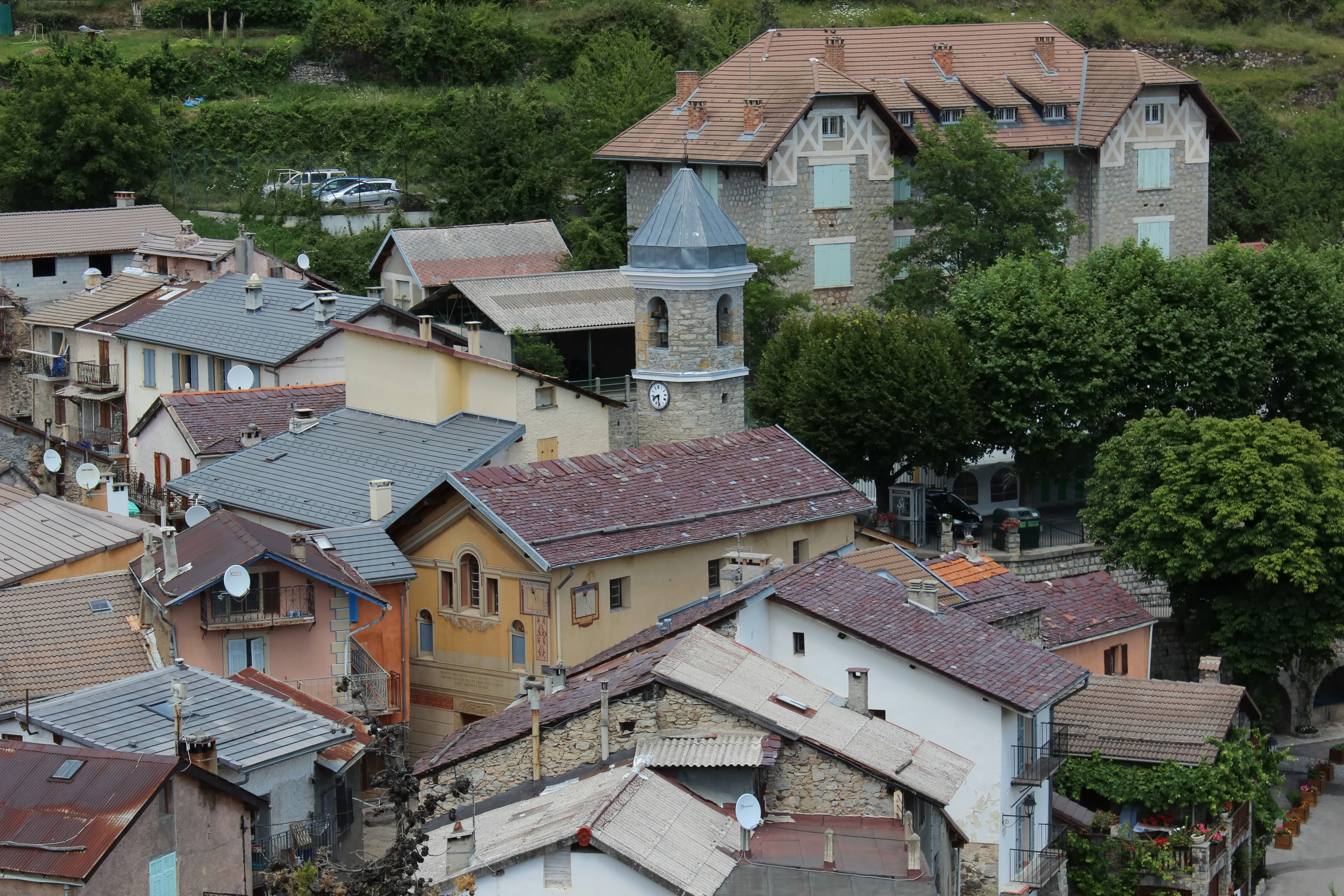 Le centre du village de Rimplas.